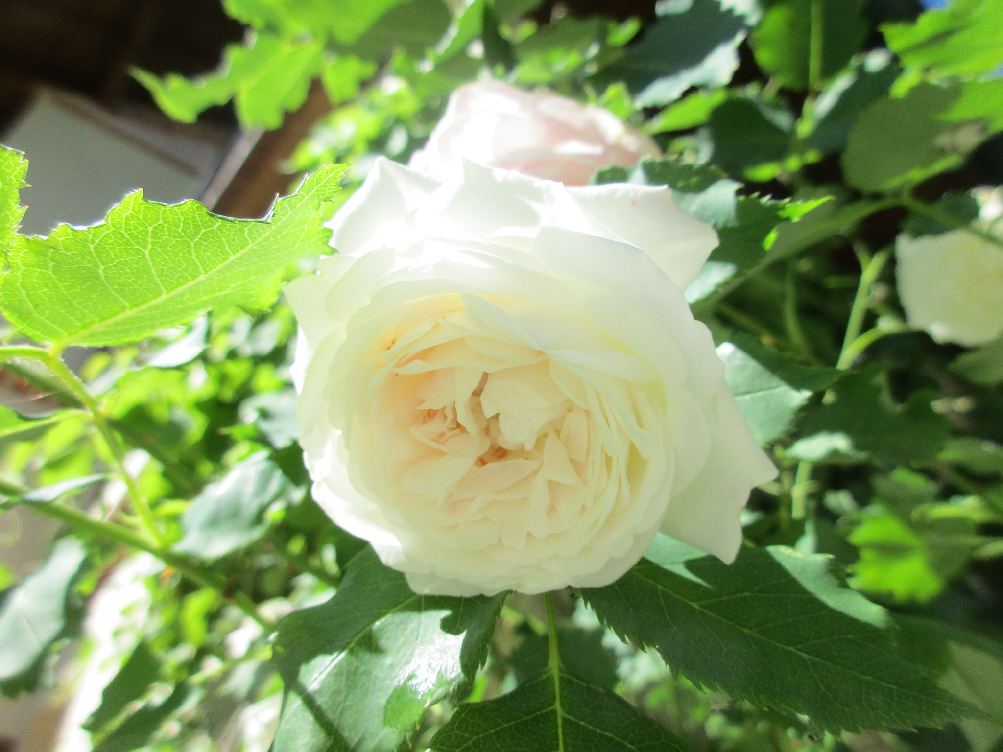 Ile aux Roses : Rose boule de Neige 1867 (Rosa borbonica)